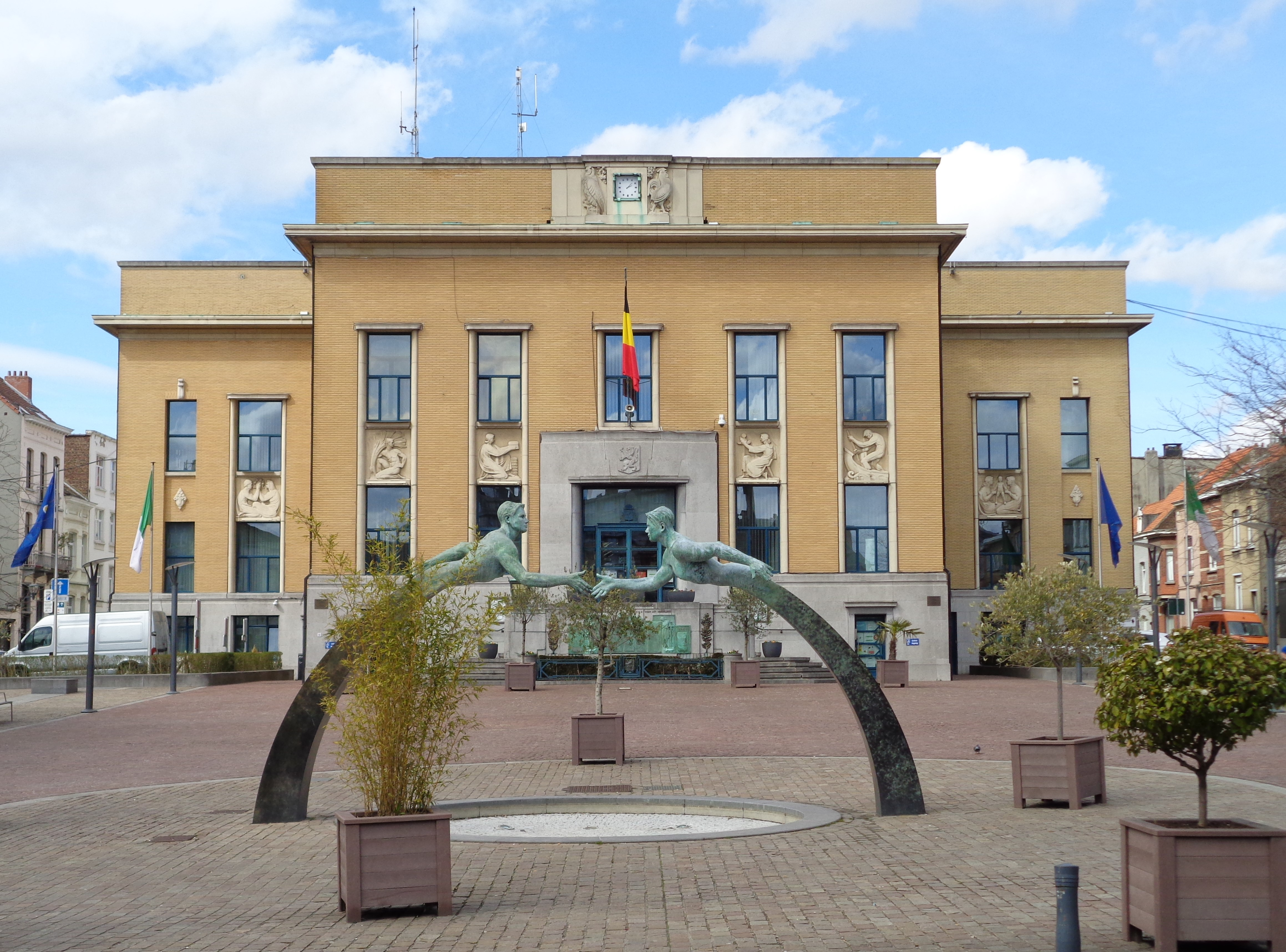 Rathaus der Gemeinde Koekelberg in der Hauptstadtregion Brüssel, Place Henri Vanhuffel